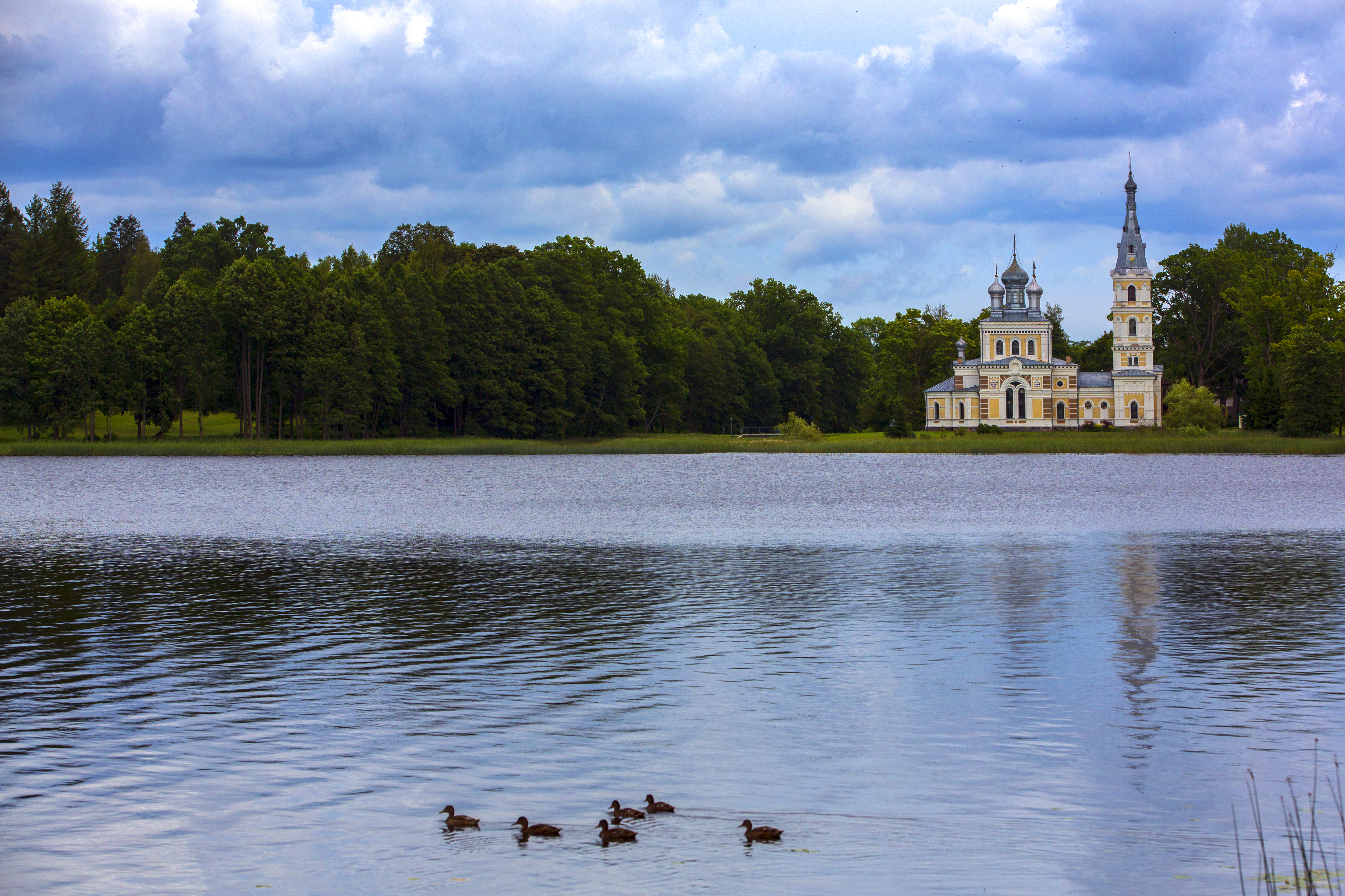 Стамериена, Латвия